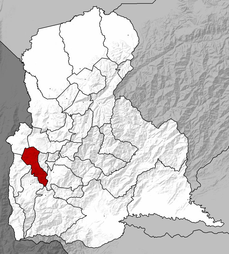 Municipio Libertad - Táchira